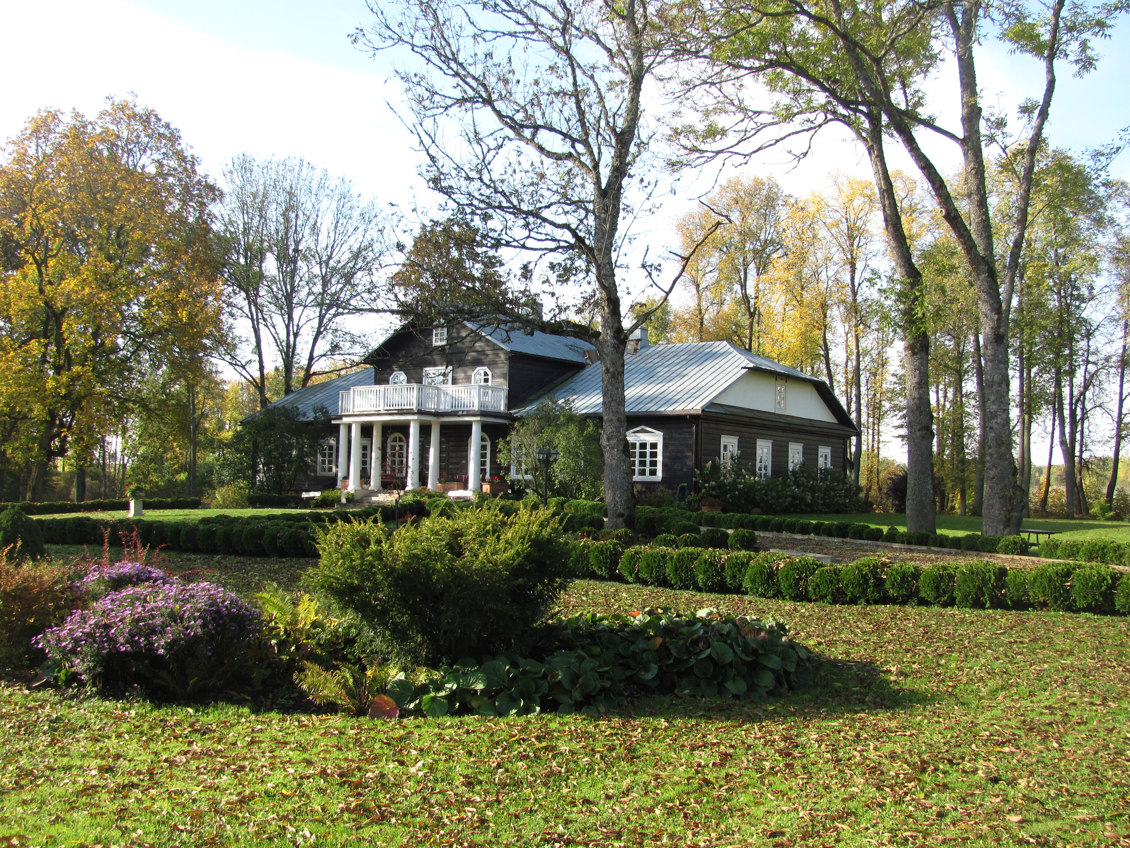 Gačionys 42260, Lithuania